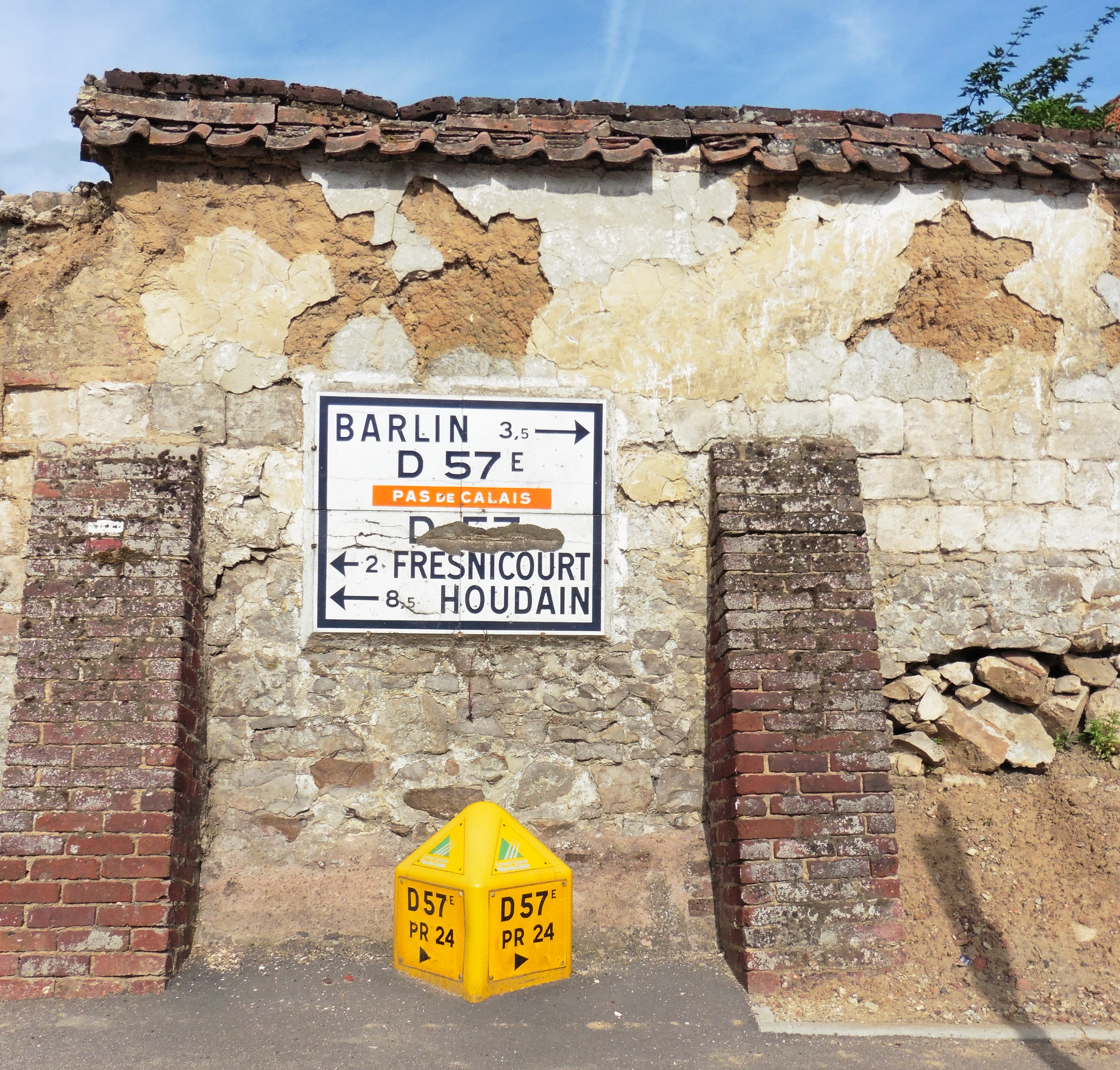 Borne Michelin à Verdrel hameau de la commune de Fresnicourt-le-Dolmen dans le Pas-de-Calais Nord-Pas-de-Calais.- France.